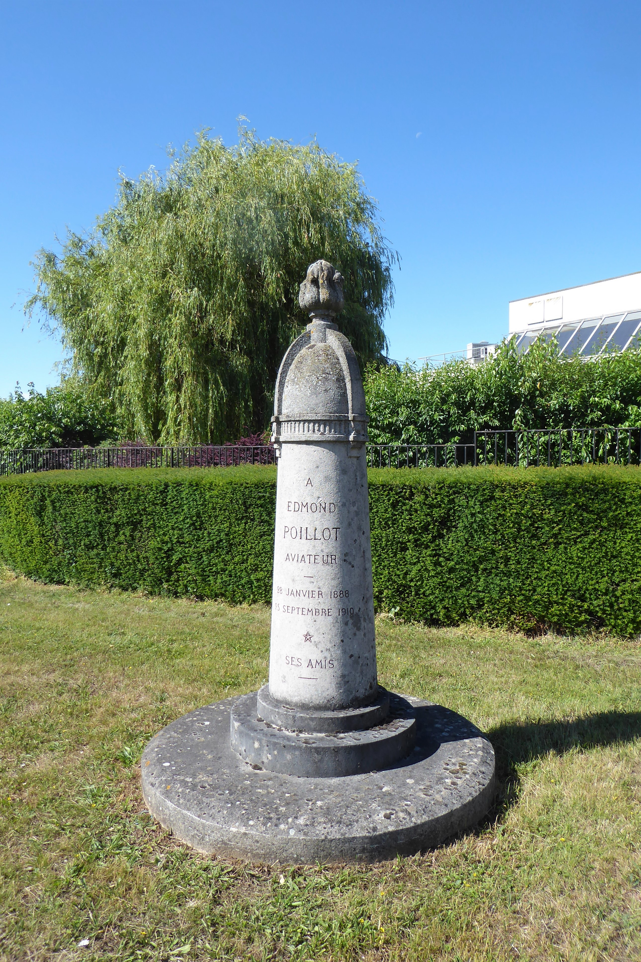 Monument à Edmond Poillot, angle rue Edmond Poillot rue de Sours Chartres, Eure-et-Loir, France.